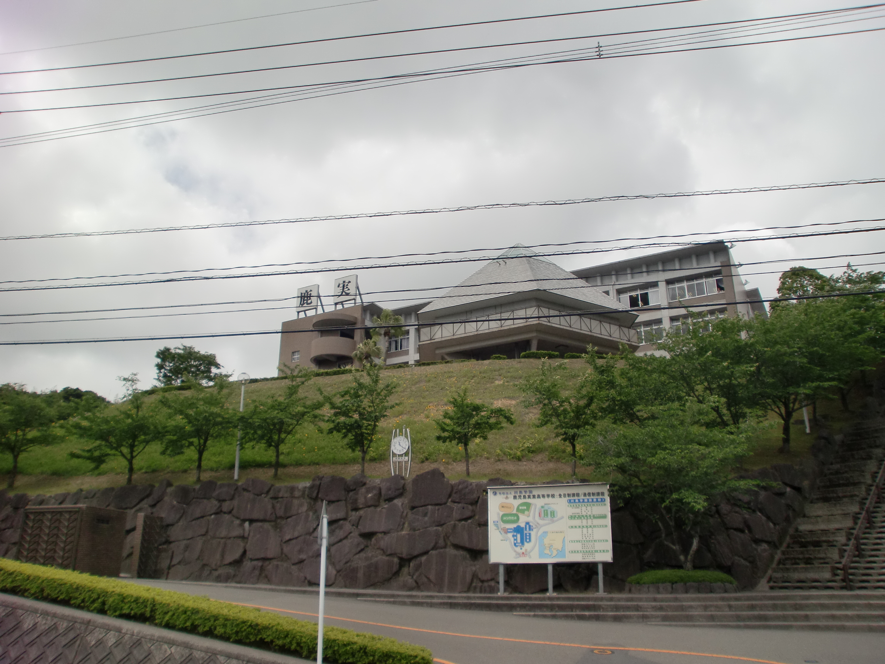 鹿児島実業高等学校の外観。